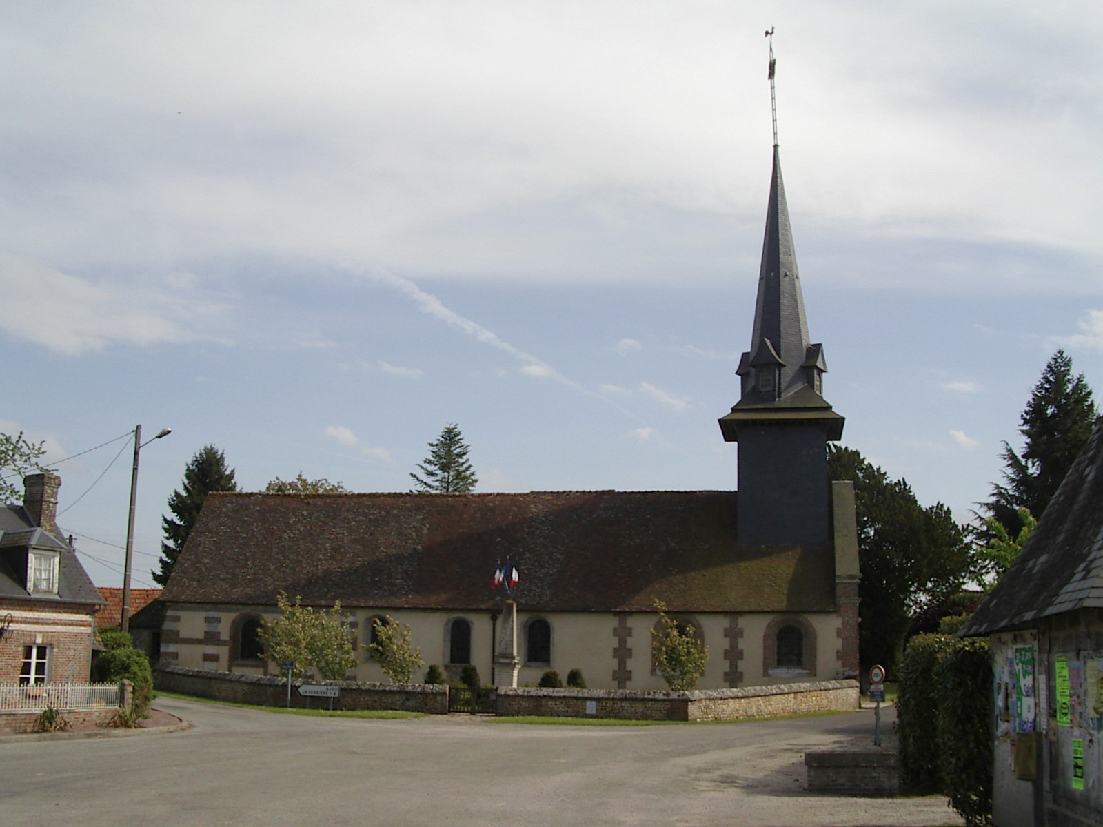 Eglise de Le-Noyer-en-Ouche (France, Eure)